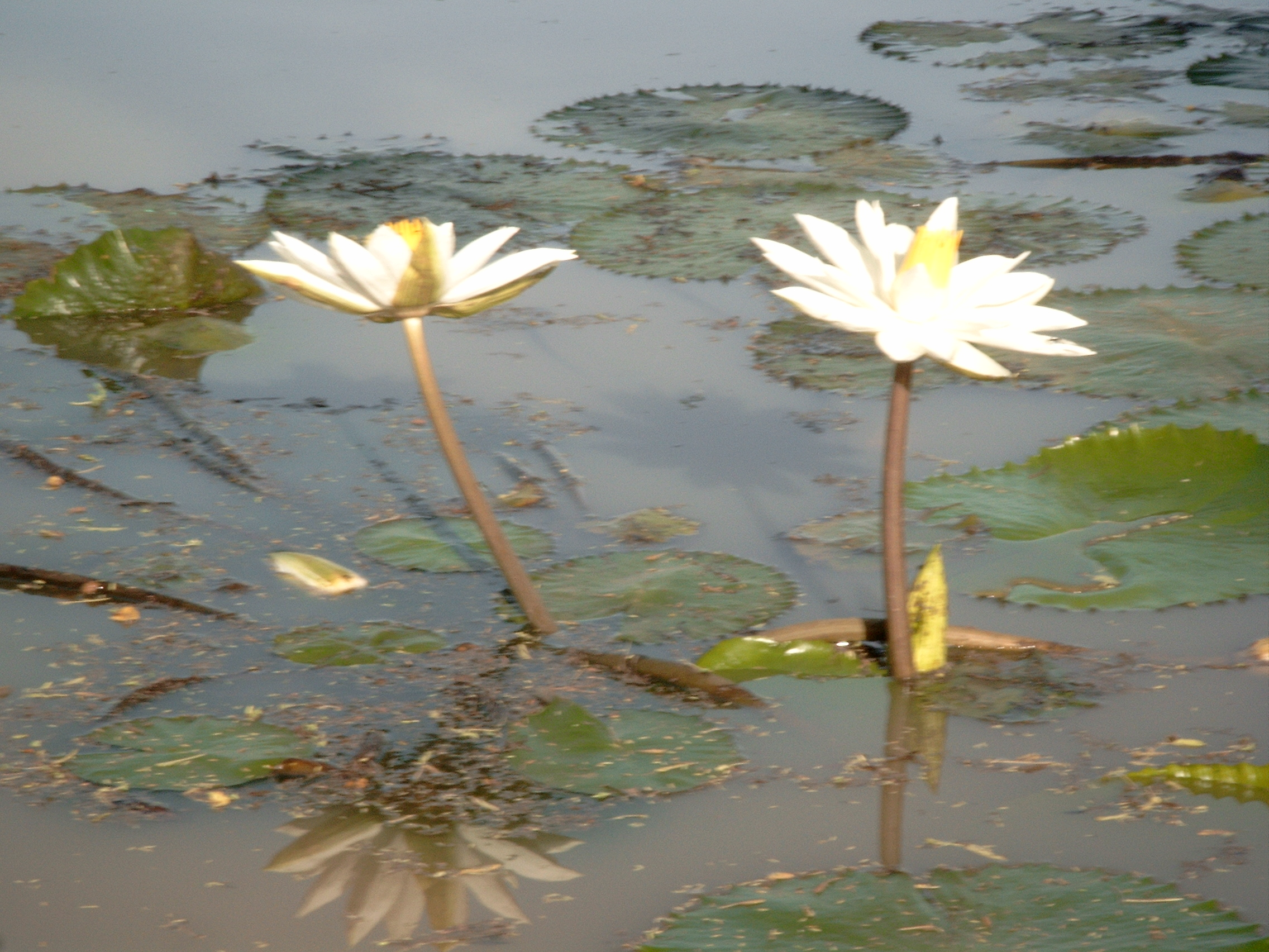 Nymphaea lotus. Béli, Burkina Faso.